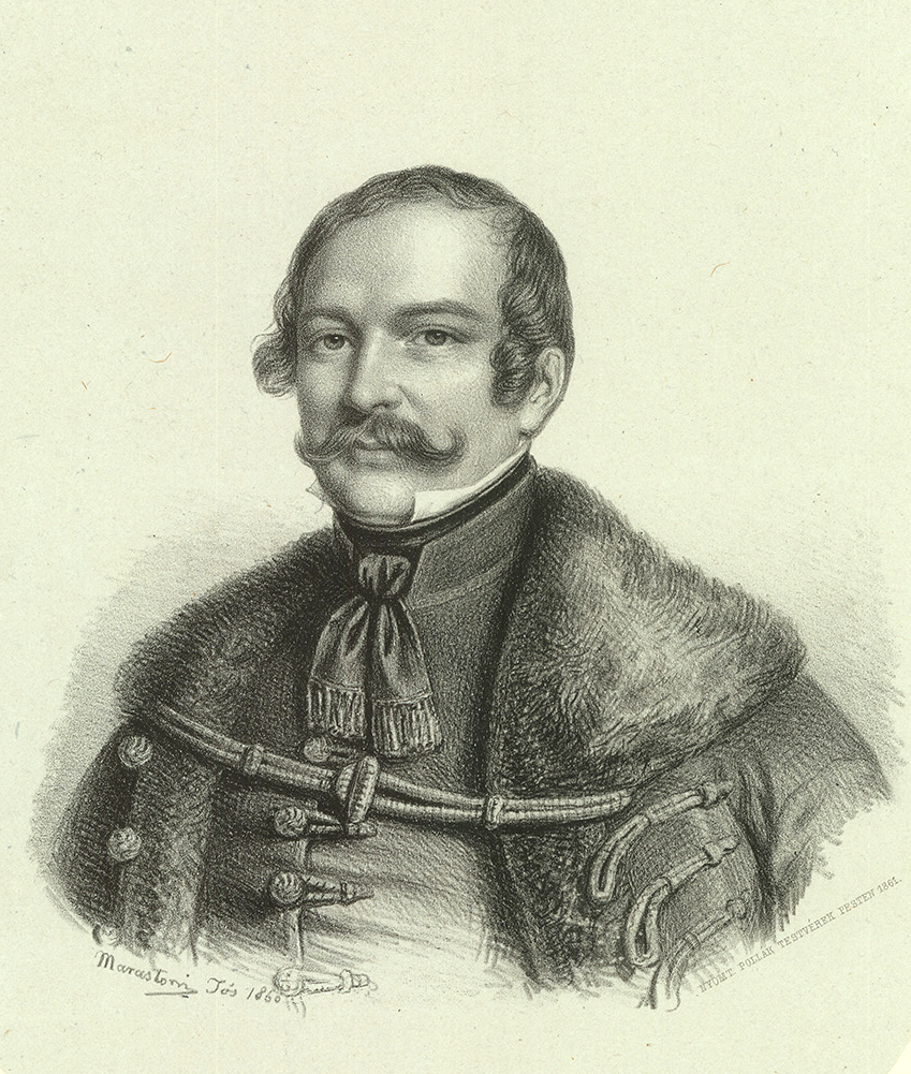 Jeszenák János (1800–1849) poltikus, kormánybiztos, az 1848–49-es szabadságharc vértanúja. Rusz Károly metszete. (Vasárnapi Ujság, 1868)